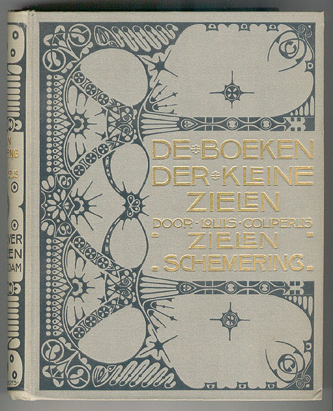 Boekomslag: De boeken der kleine zielen - Zielenschemering. 1e druk 1901. Auteur: L. Couperus. Bandontwerp: T. Neuhuys. Uitgeverij: L.J. Veen